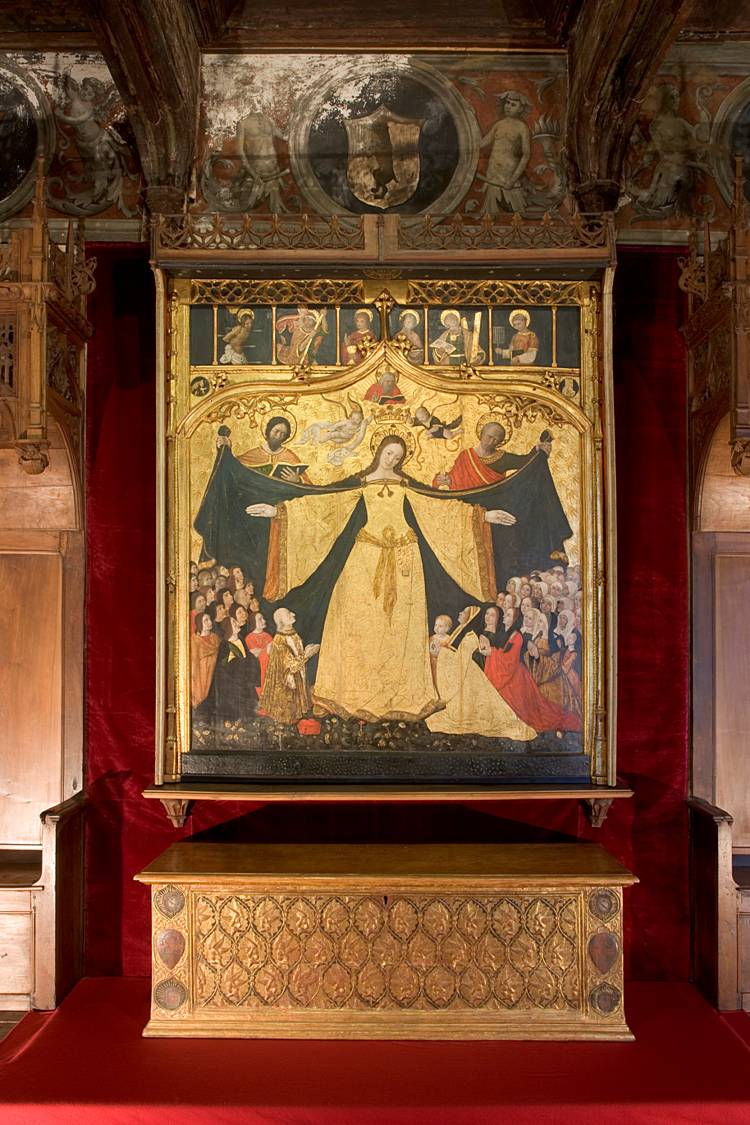 Saluzzo, Museo Civico Casa Cavassa; Descrizione = pala della Madonna della Misericordia di Hans Clemer